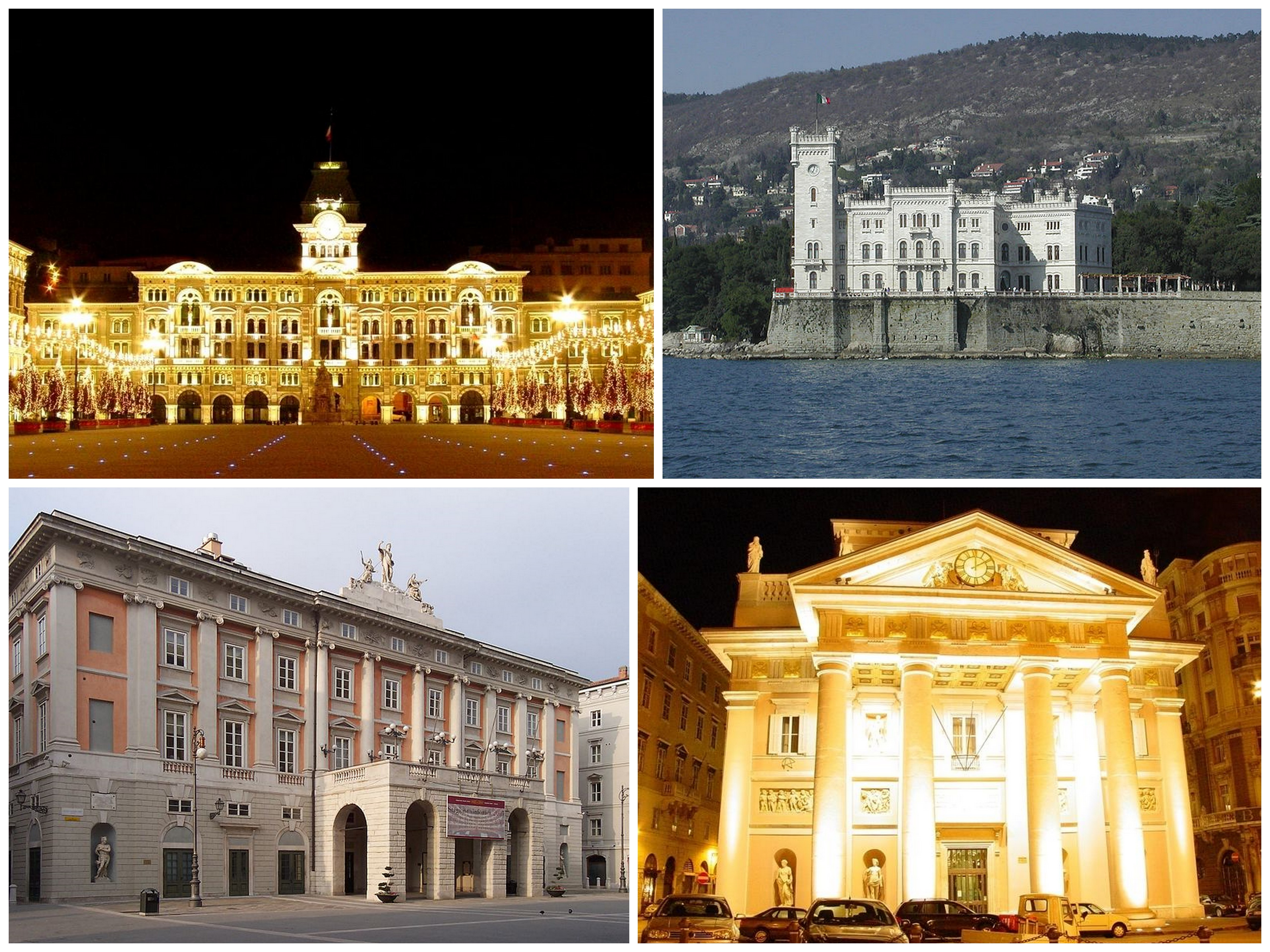 Collage di varie foto di Trieste